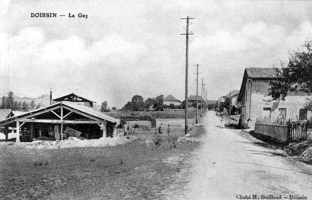 Doissin (Isère) Le Gaz